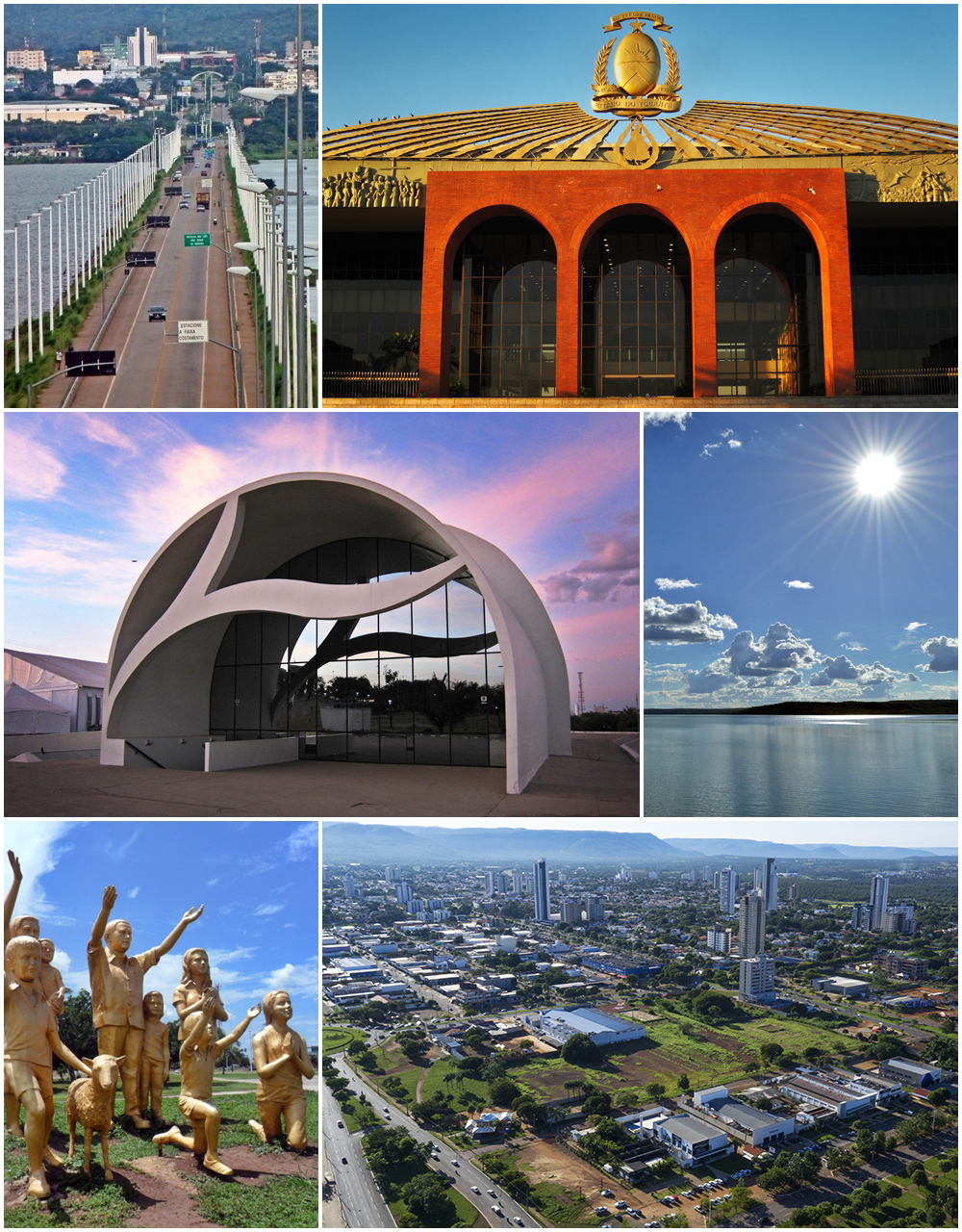 Montagem de Palmas.